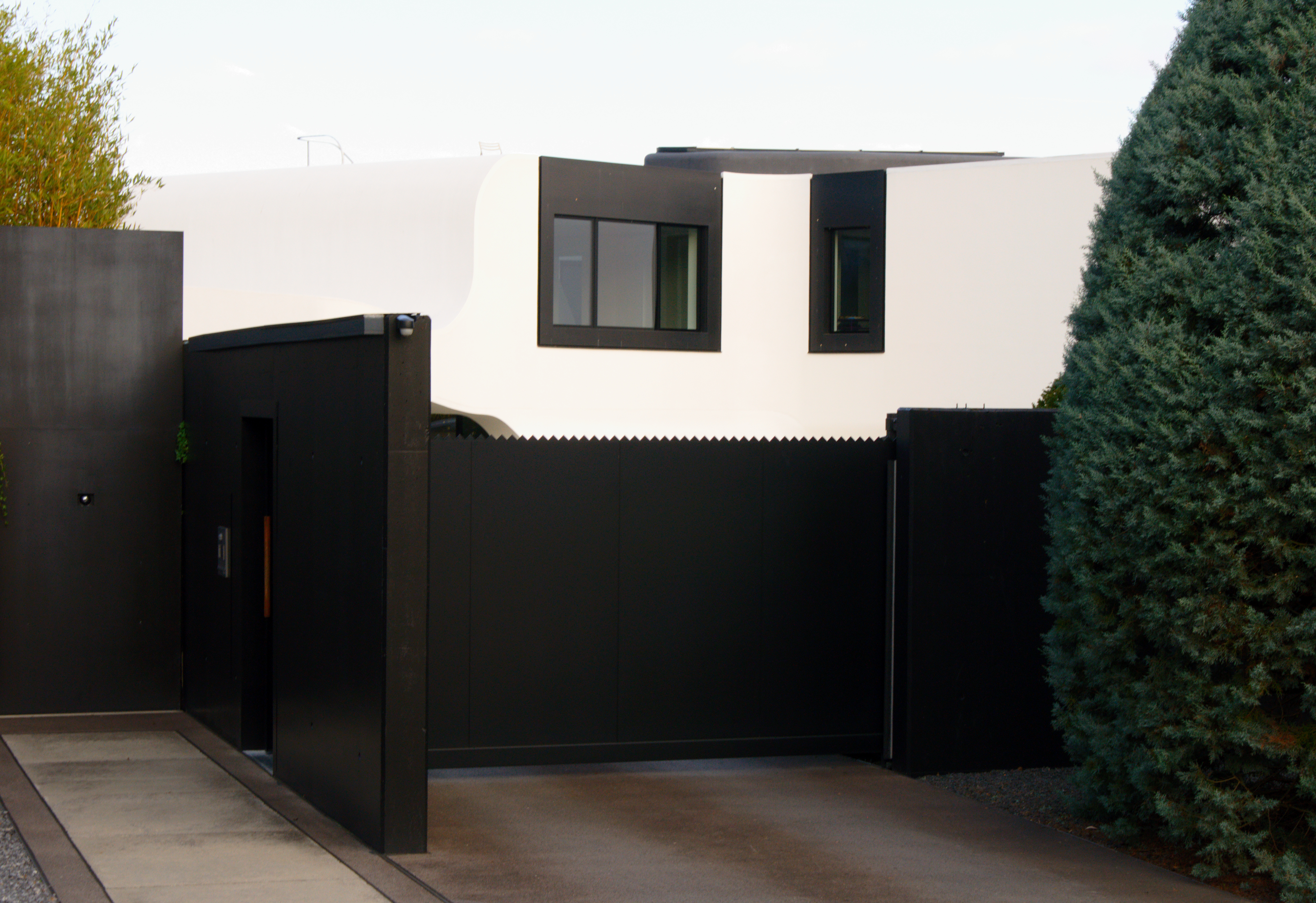 DupliCasa, Benningen am Neckar